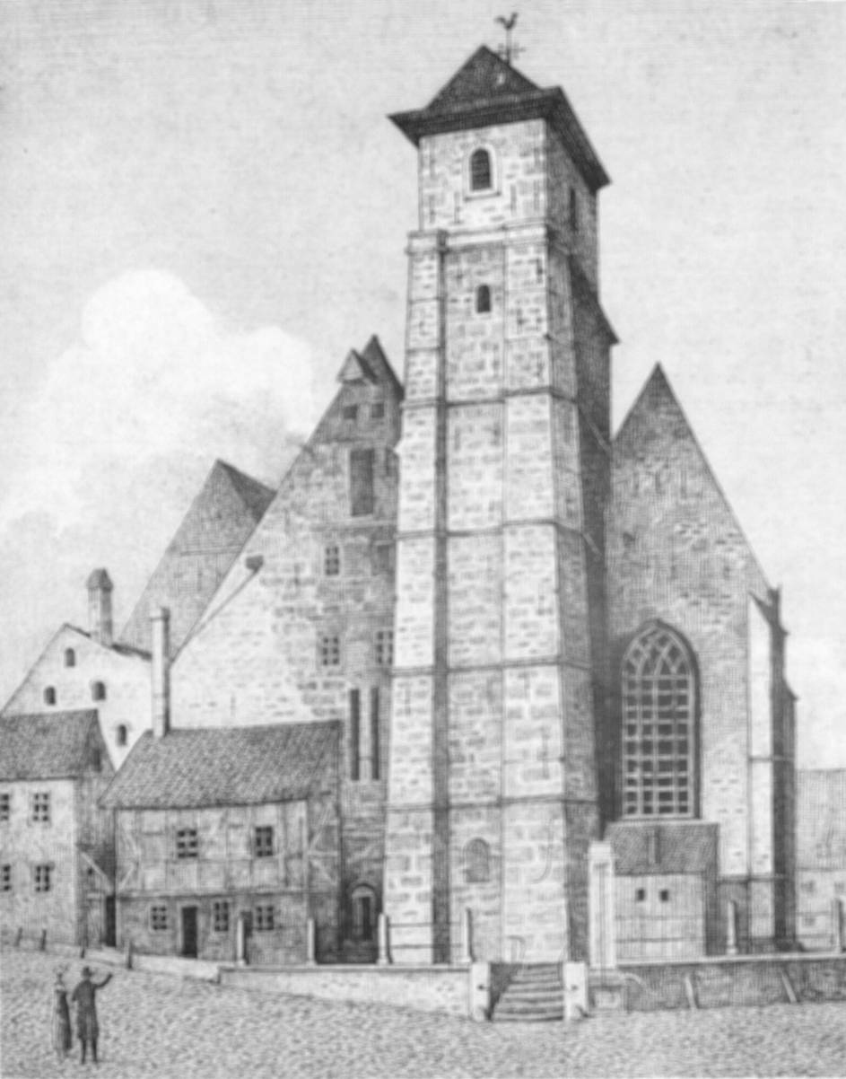 Stephanikirche in Bremen von Westen um 1830 (Stahlstich): Hallenschiff mit Längsdächern, Südturm mit schlichtem Pyramidendach, Fundament des Nordturms mit Wohnhaus überbaut